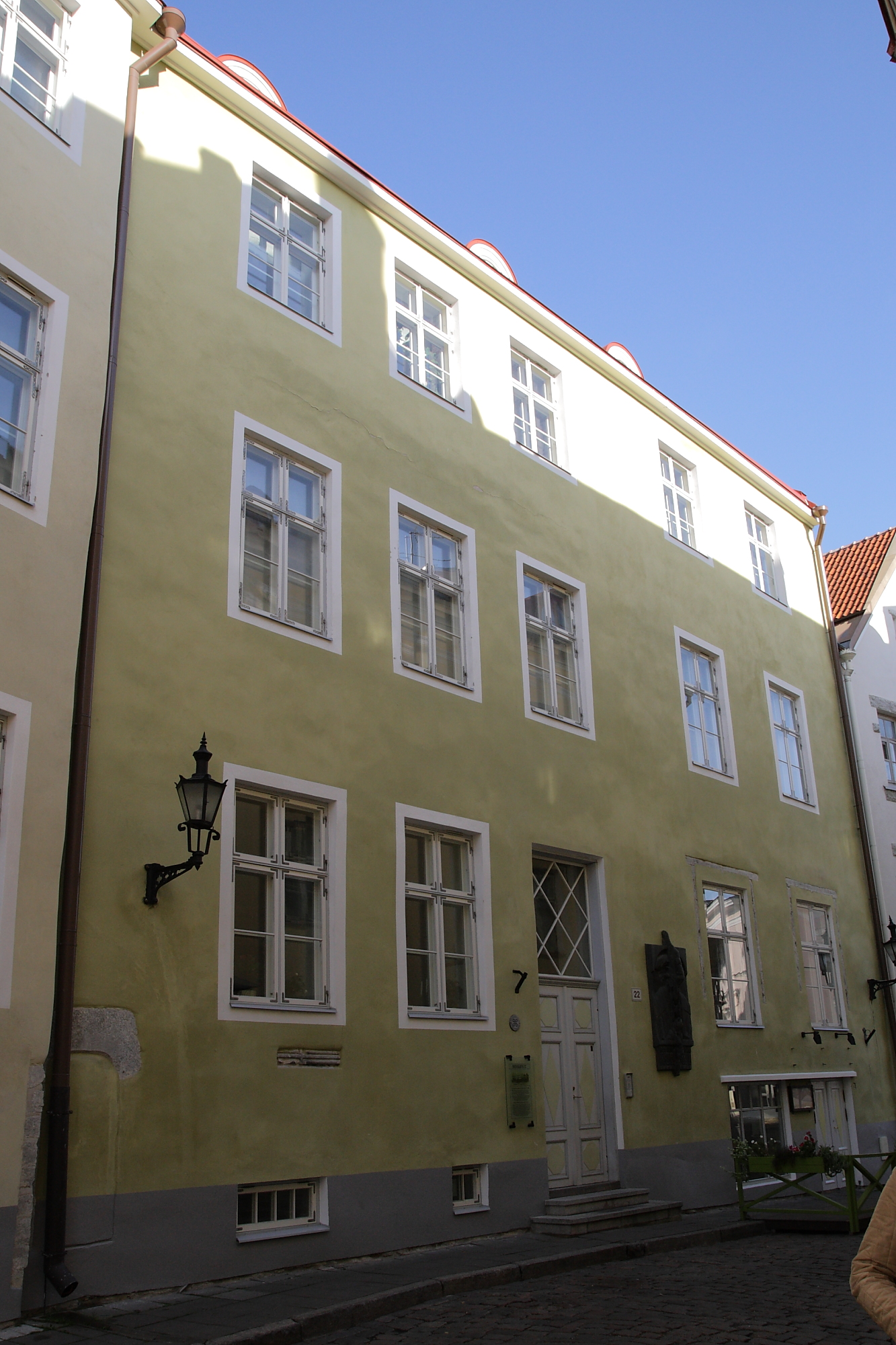 Tallinn, maja, kus elas Michel Sittow